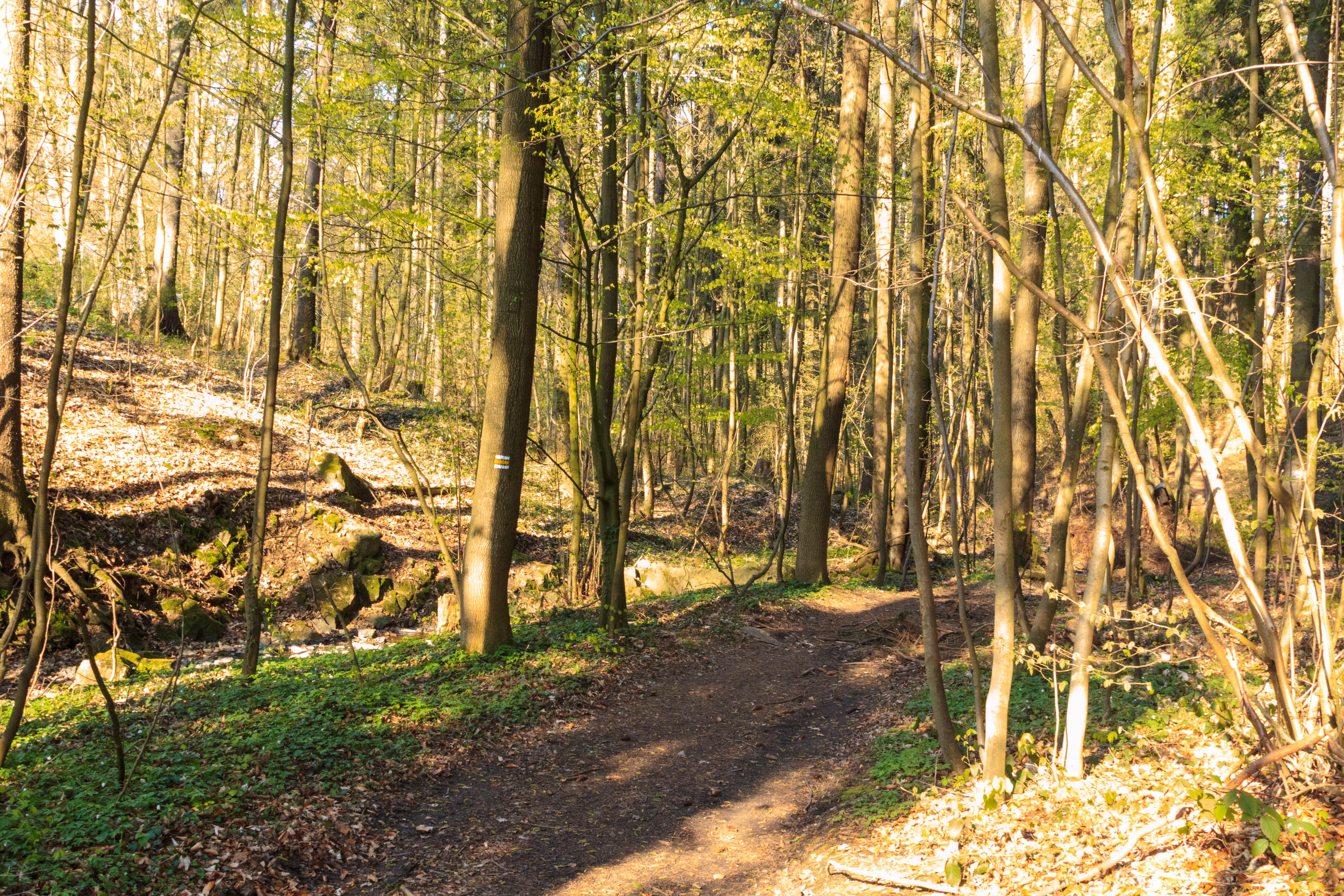 Lovětínská rokle Project: Chráněná území.